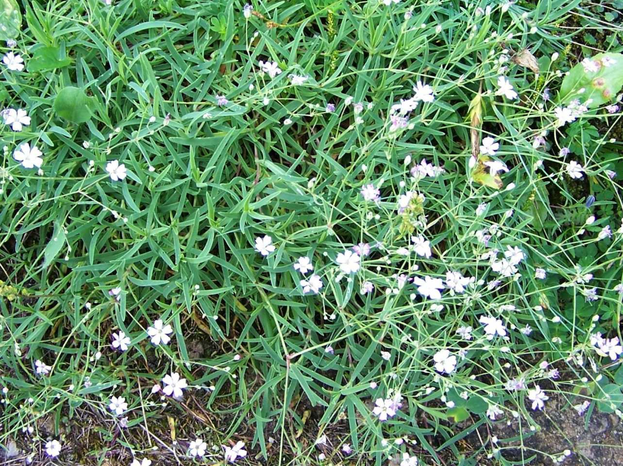 Gypsophila repens (pl. łyszczec rozesłany), habitat: Tatra Mountains, Kalatówki